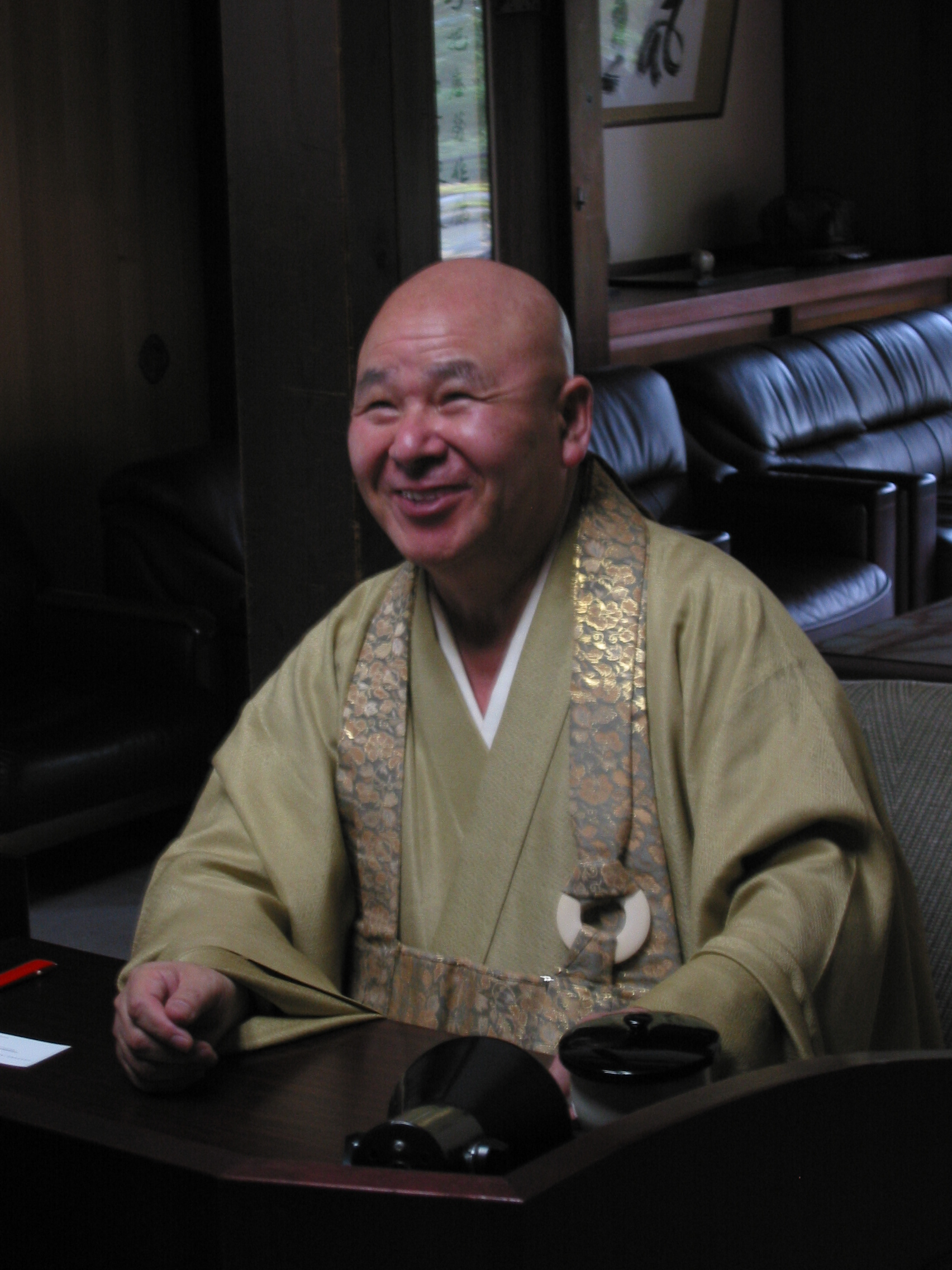 Keido Fukushima of Tofuku-ji